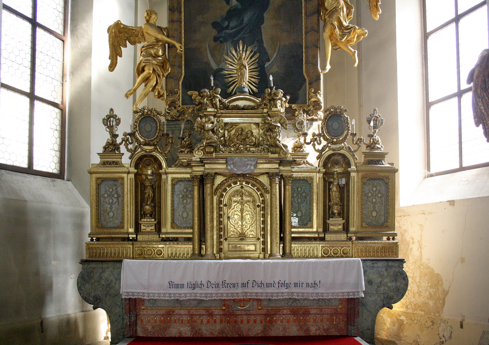 Mensa mit Tabernakel der Pfarrkirche Zur Unbefleckten Empfängnis in der burgenländischen Gemeinde Wimpassing an der Leitha.